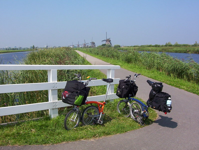 2 Brompton en cyclocamping en Hollande